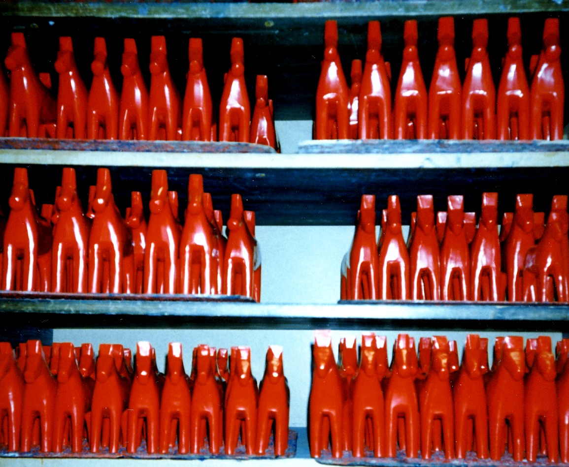 Dalahästtillverkning